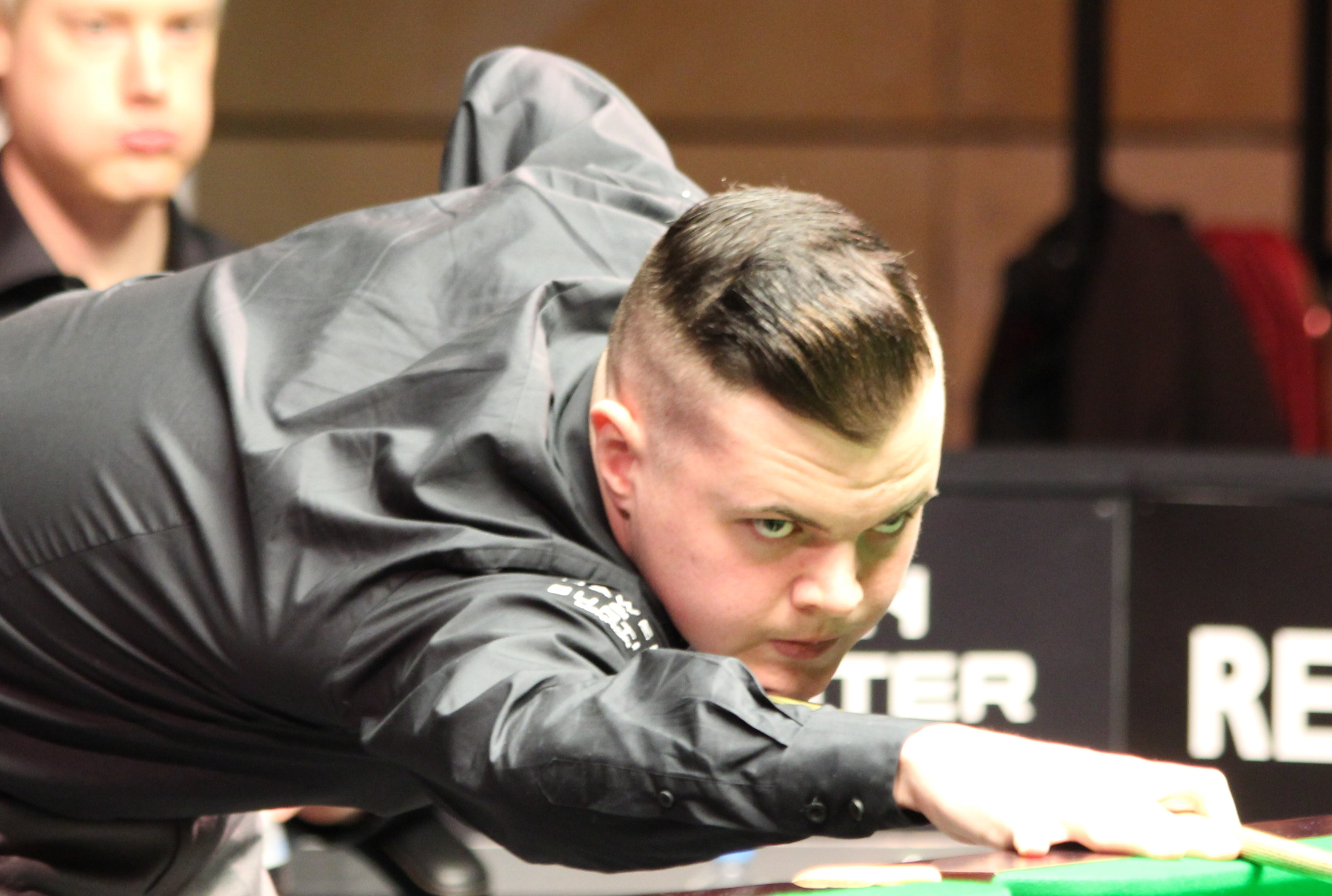 Elliot Slessor beim Paul Hunter Classic 2014